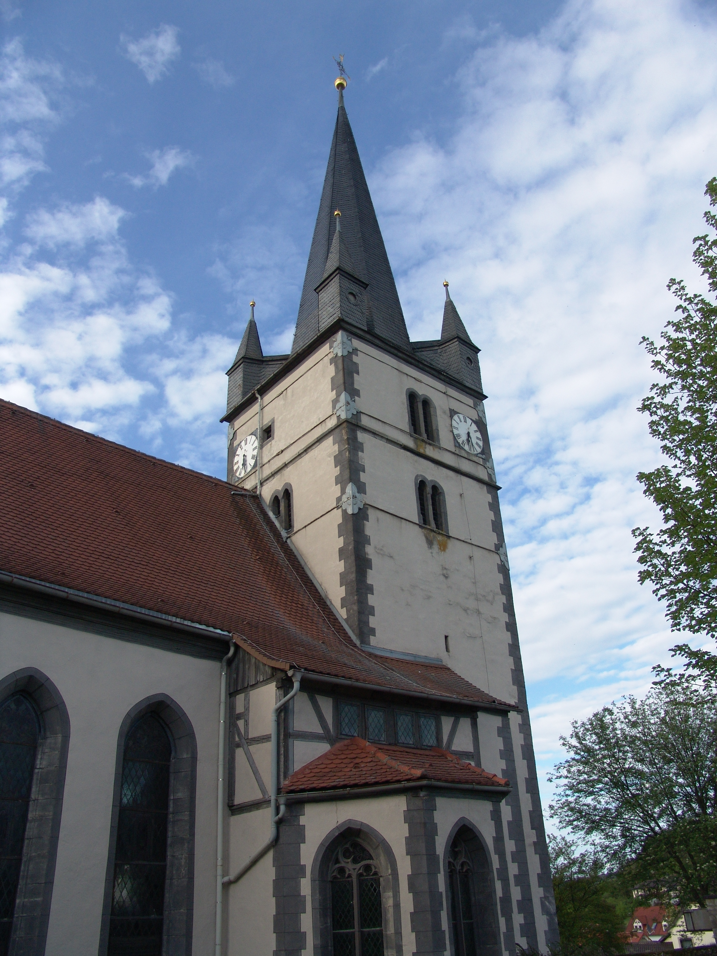 evang.-luth. Kirche St. Michael in Sondheim vor der Rhön